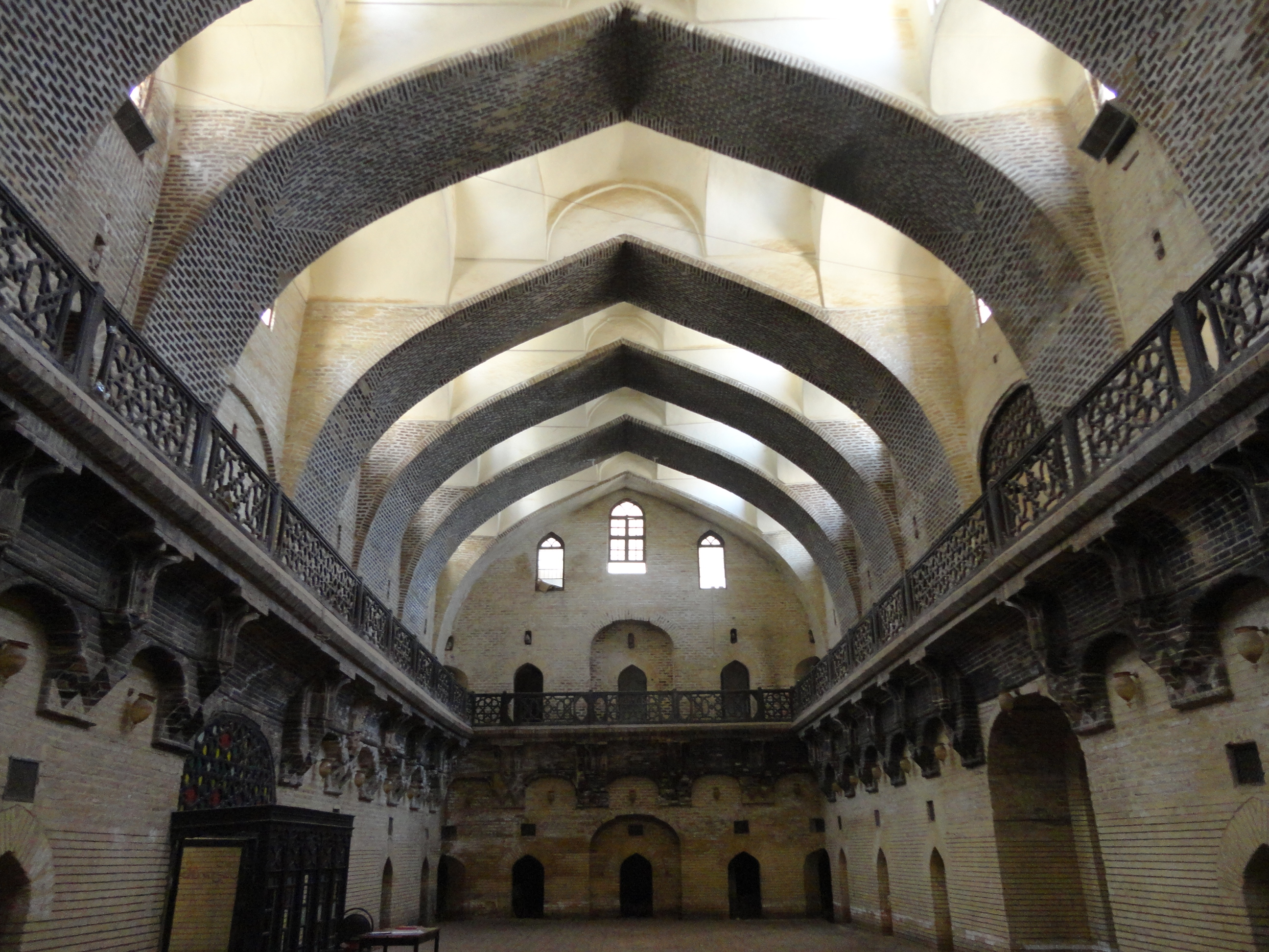 خان مرجان الاثري